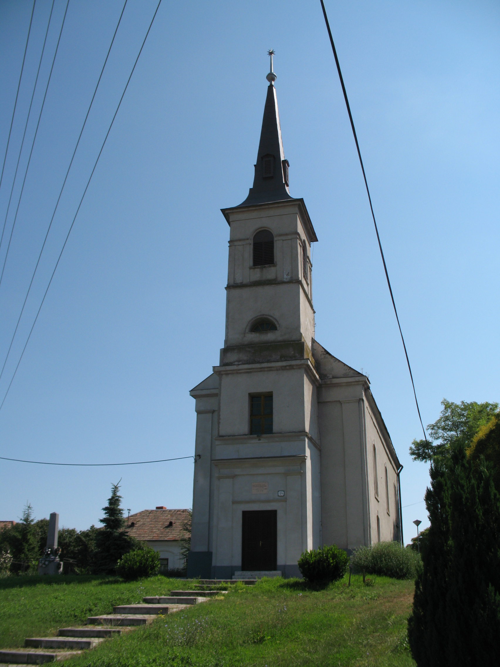 Kétfegyvernek